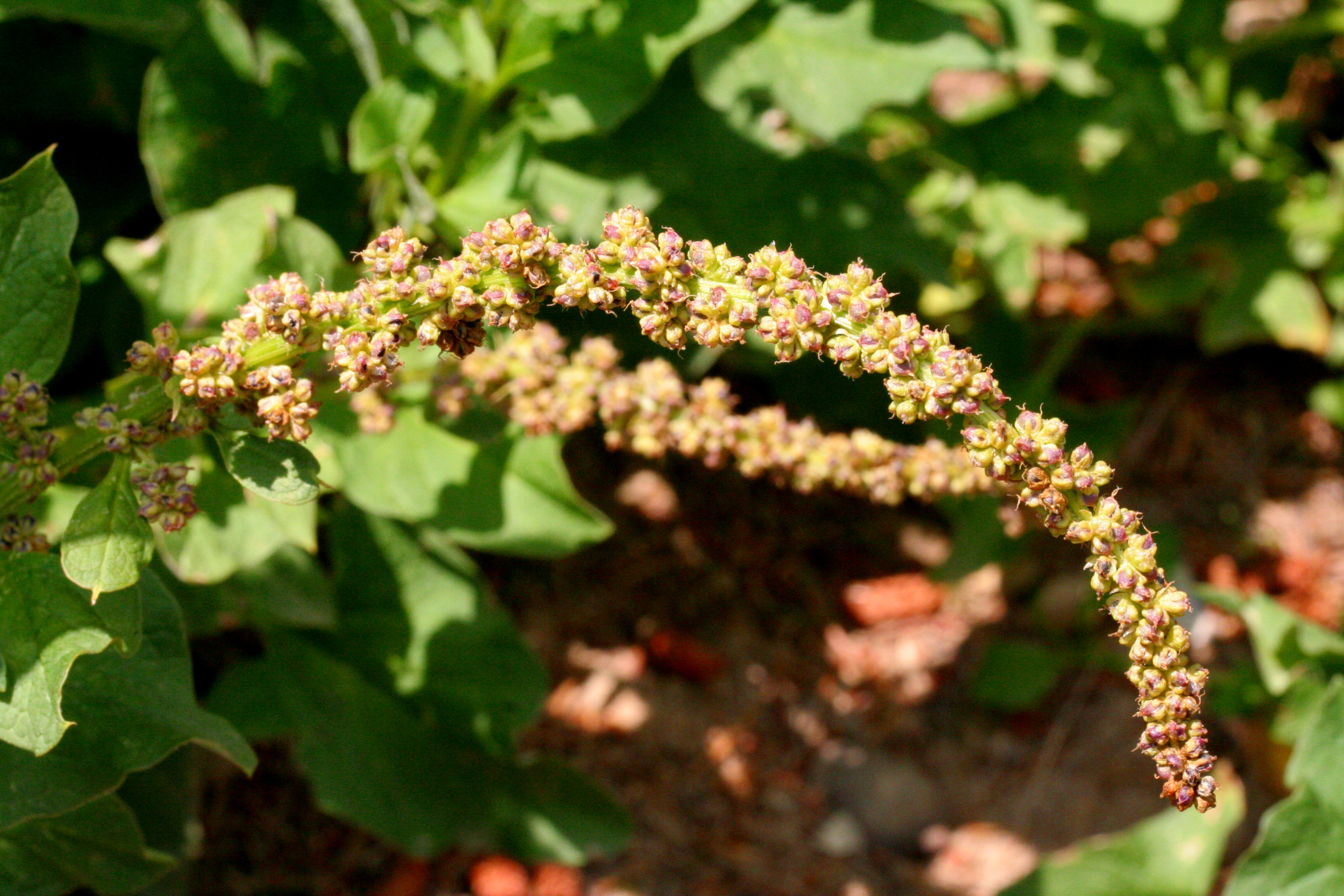 Giardino Botanico Alpino "Giangio Lorenzoni", Pian Cansiglio, Tambre d'Alpago (BL), 1000 m s.l.m.